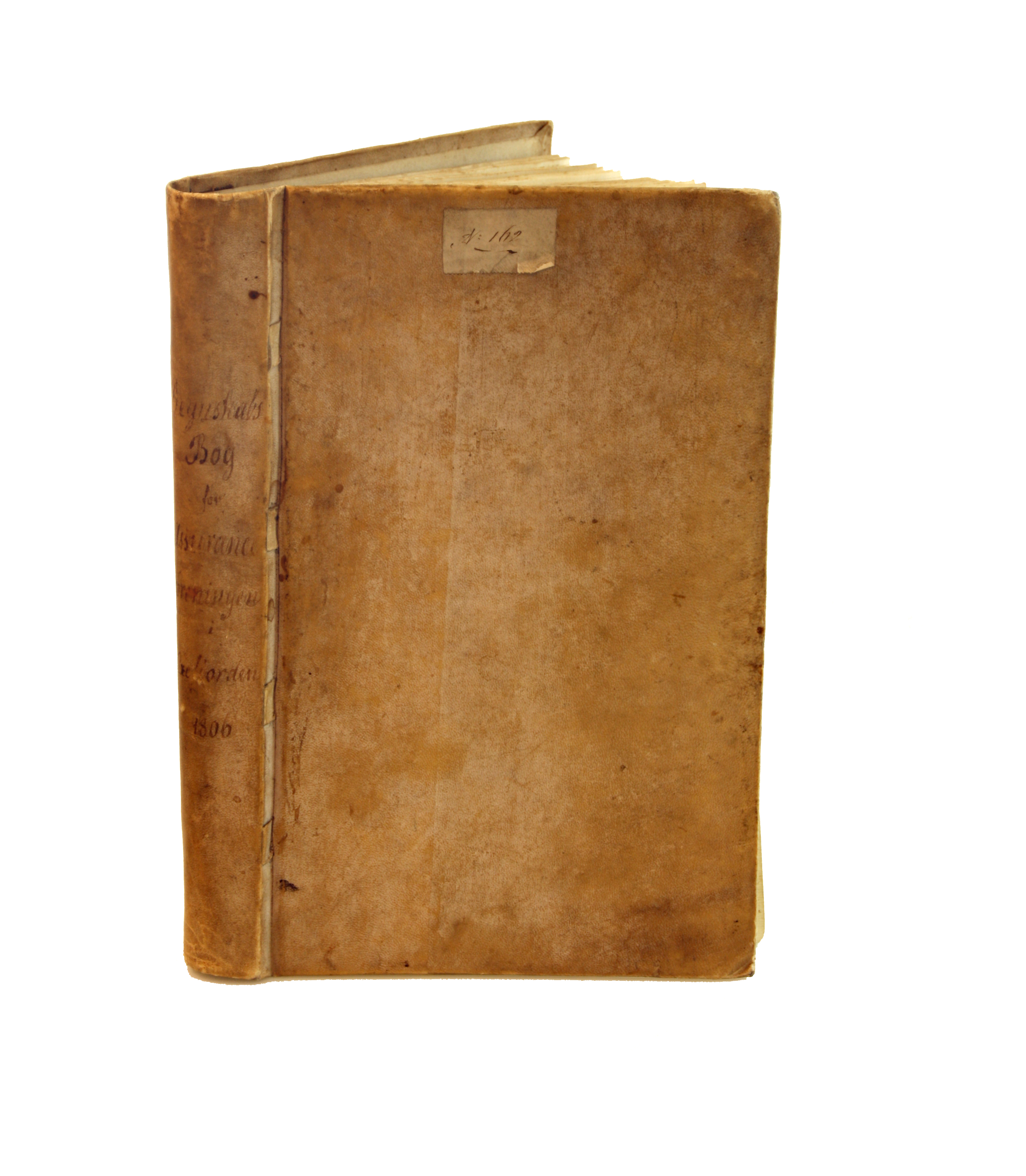 Protokoll tilhørende Oxefjordens indbyredes Assuranceselskab